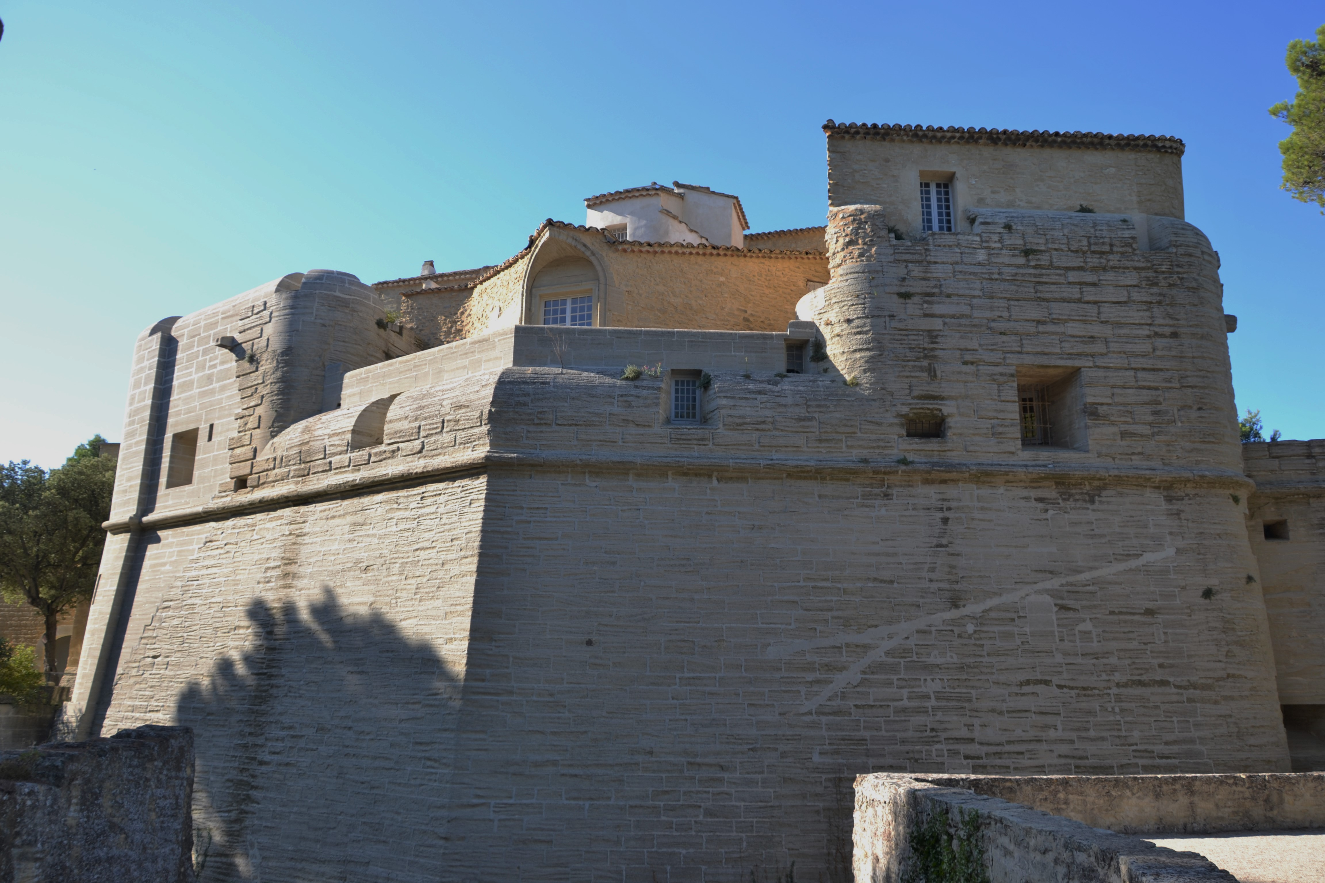 Château de Saumanechapelle, douves, escalier, voûte, salle, salon, élévation, toiture, décor intérieur .